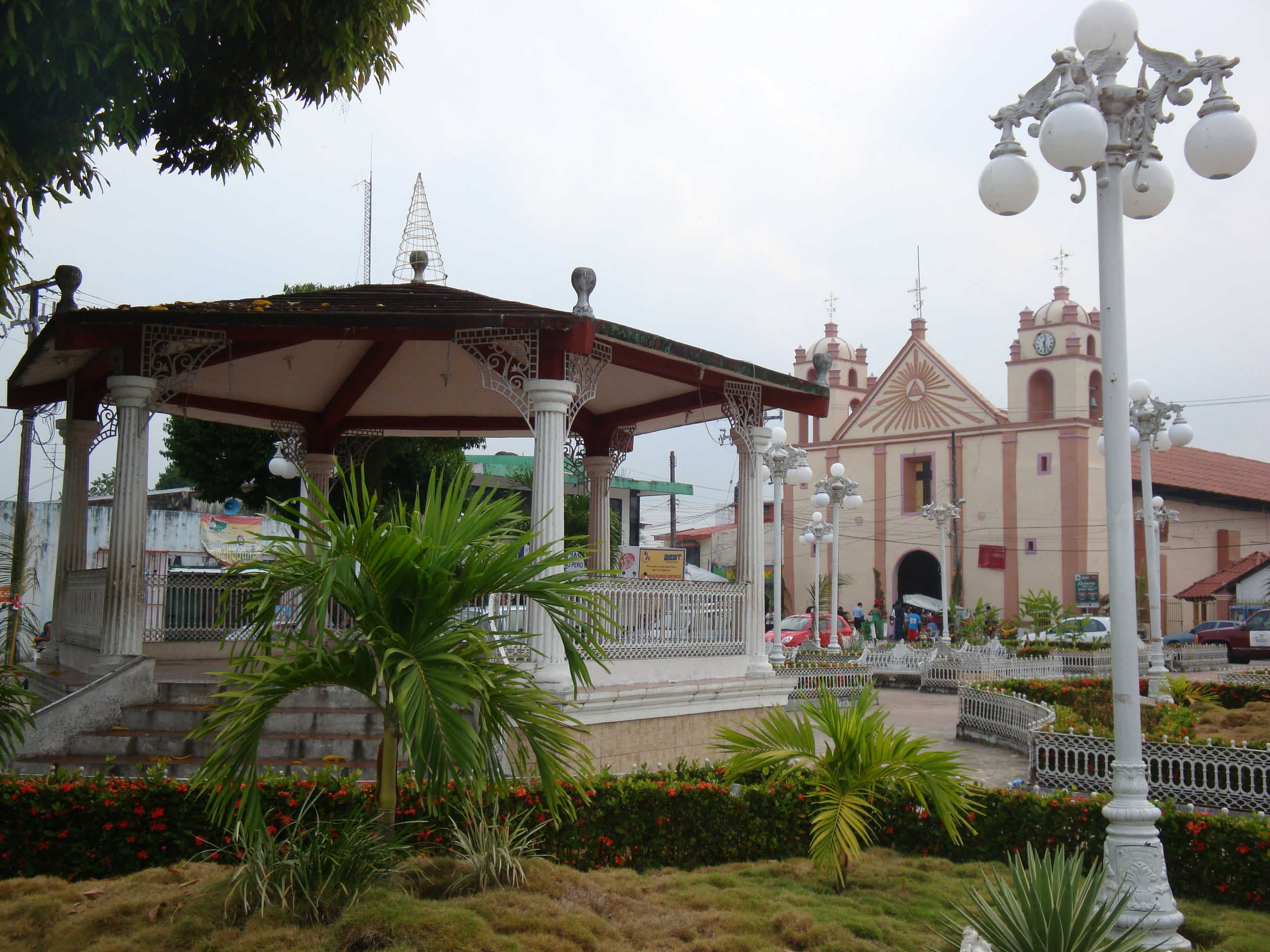 Iglesia de la Virgen de la Asunución y parque principal en la cuidad de Tacotalpa estado de Tabasco Méxco.